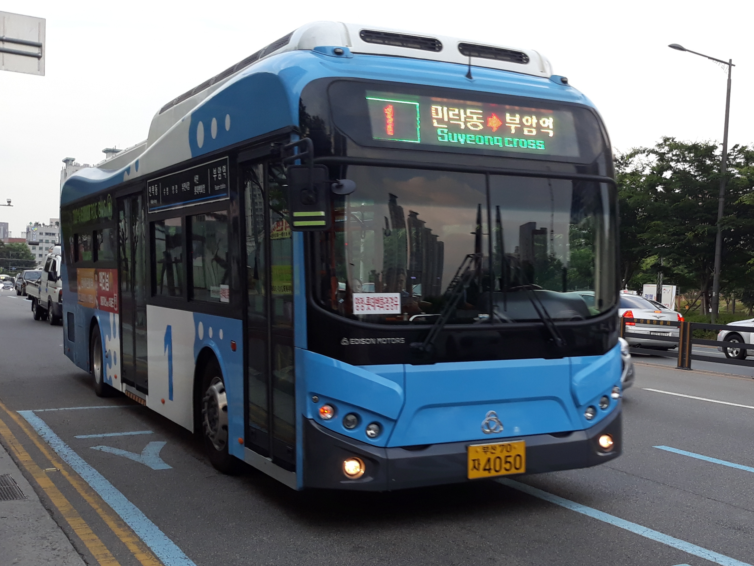 오성여객 1번 4050호